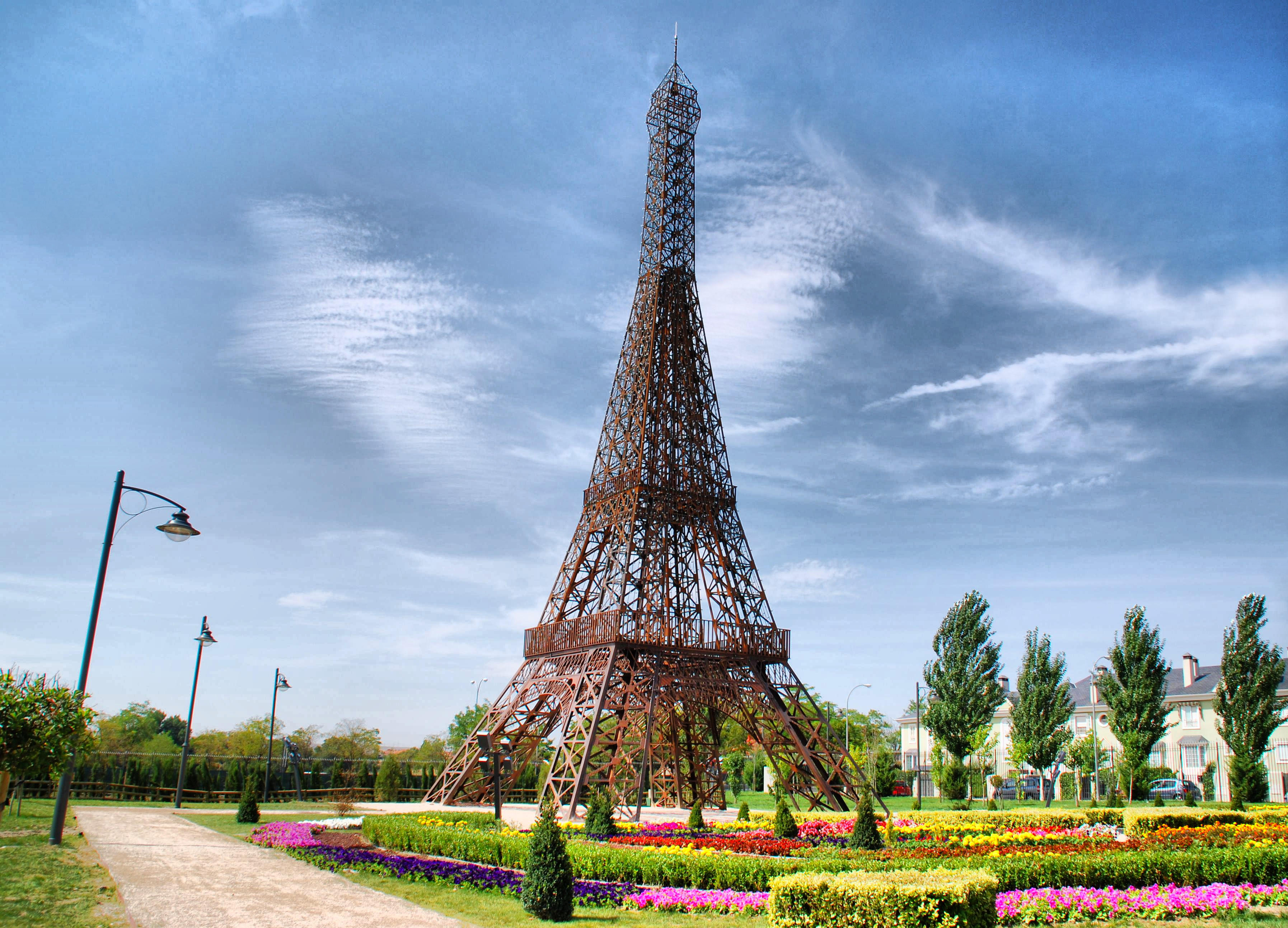 Parque Europa en Torrejón de Ardoz.